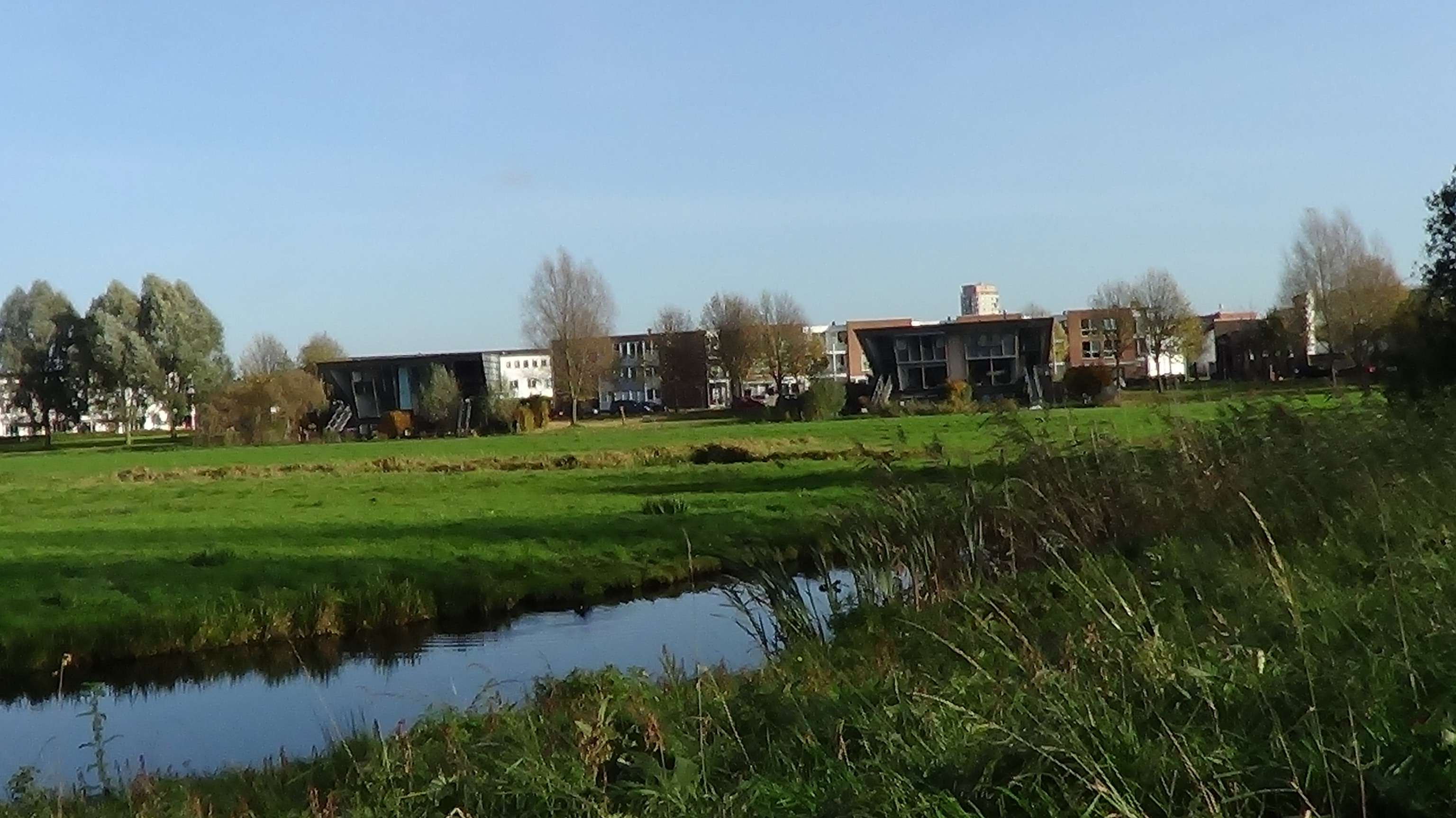 Noordelijke deel van de Vrije Geer Amsterdam Nieuw Sloten